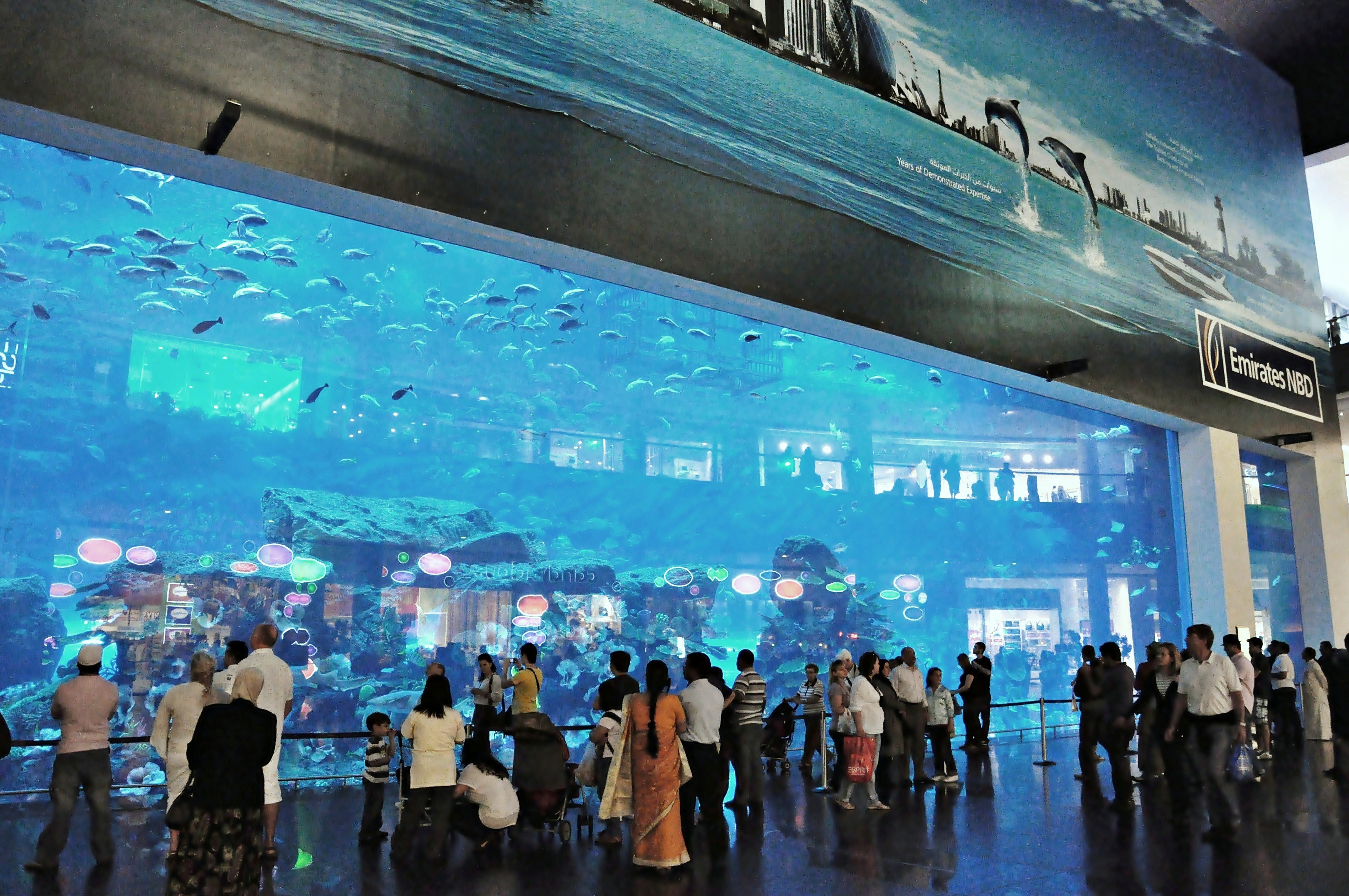 emiratos arabes